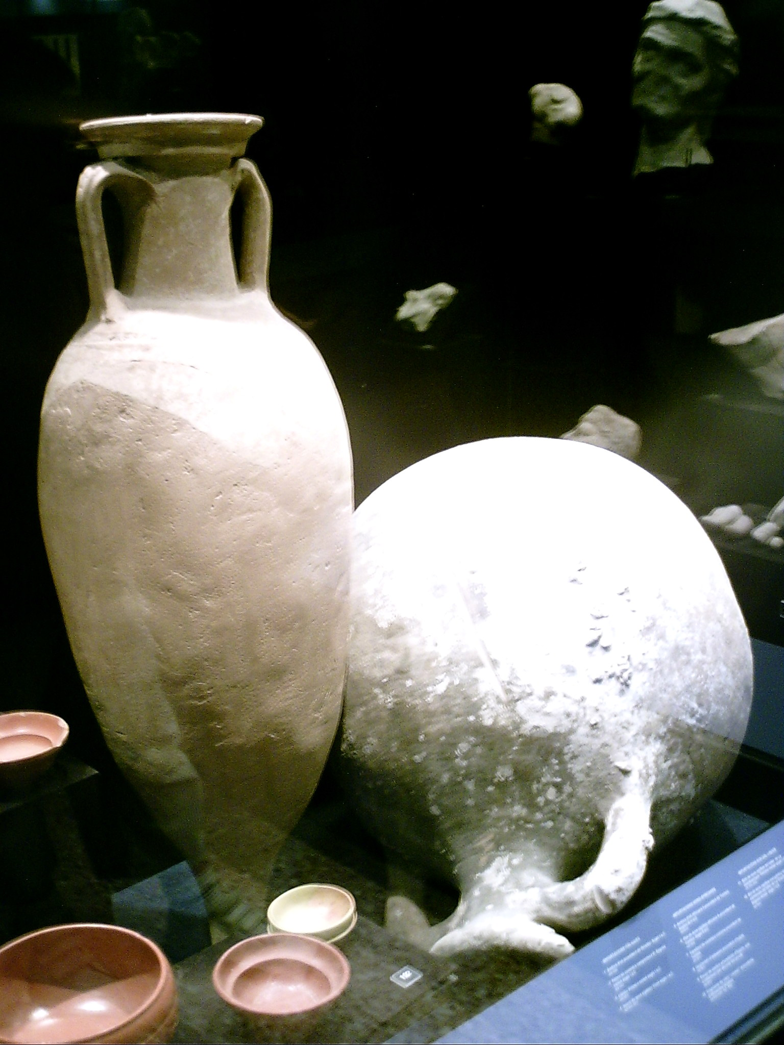 Àmfora romana, al Museu de Badalona, Badalona, Barcelonès, (Catalunya).